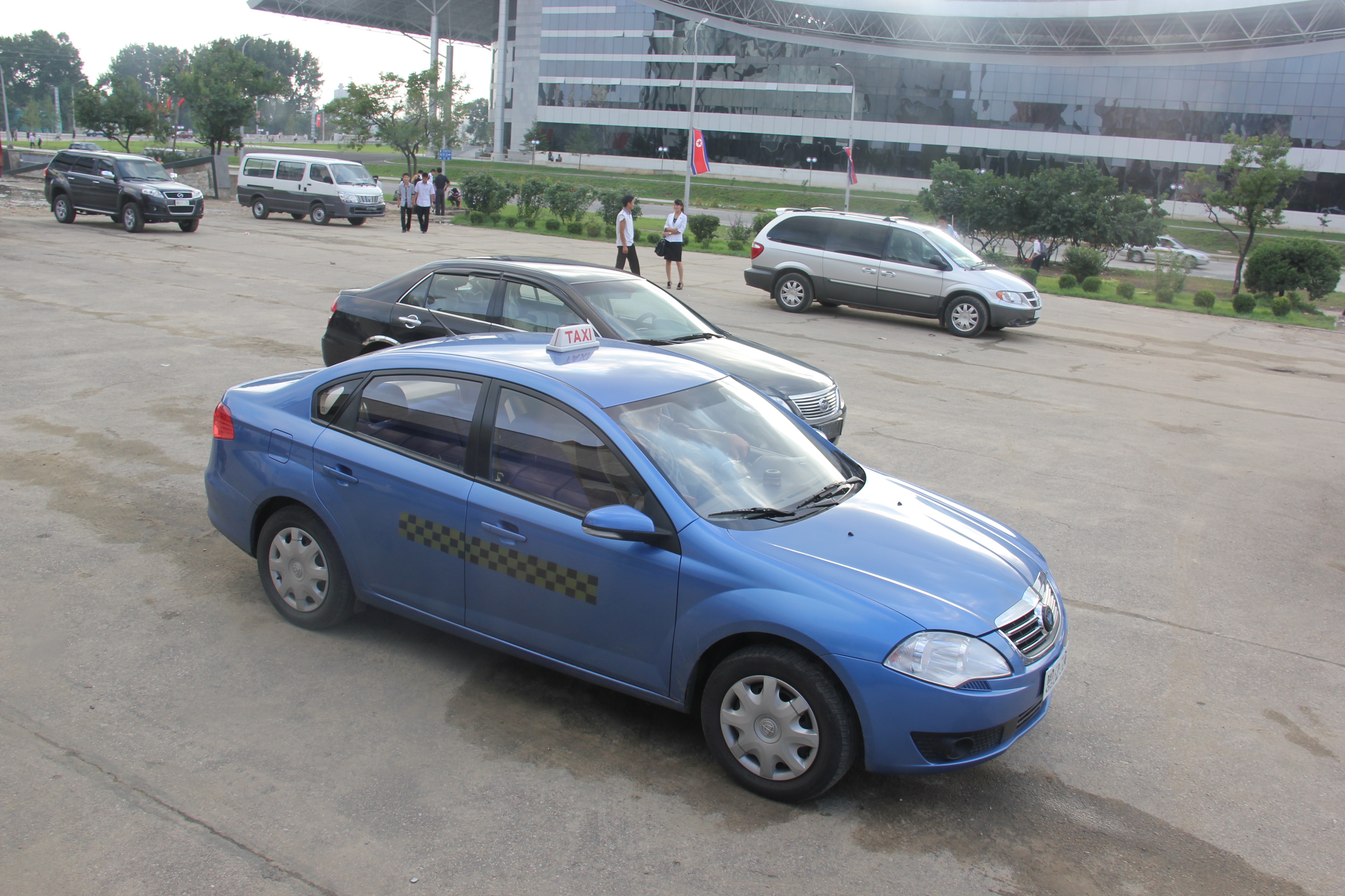 Taxi